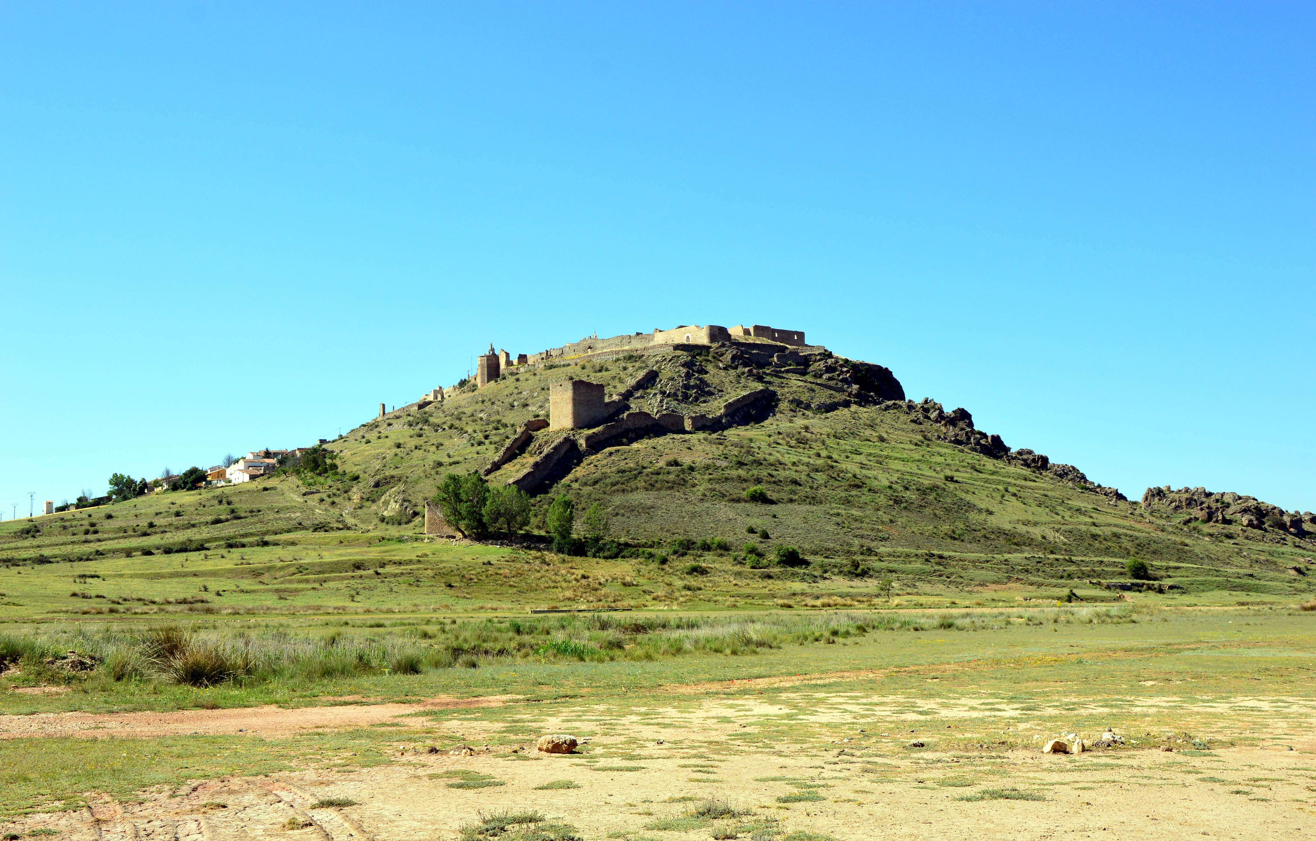 Vista general (septentrional) del cerro de Moya (Cuenca), con detalle de La Coracha descendiendo por la ladera nororiental (2017).